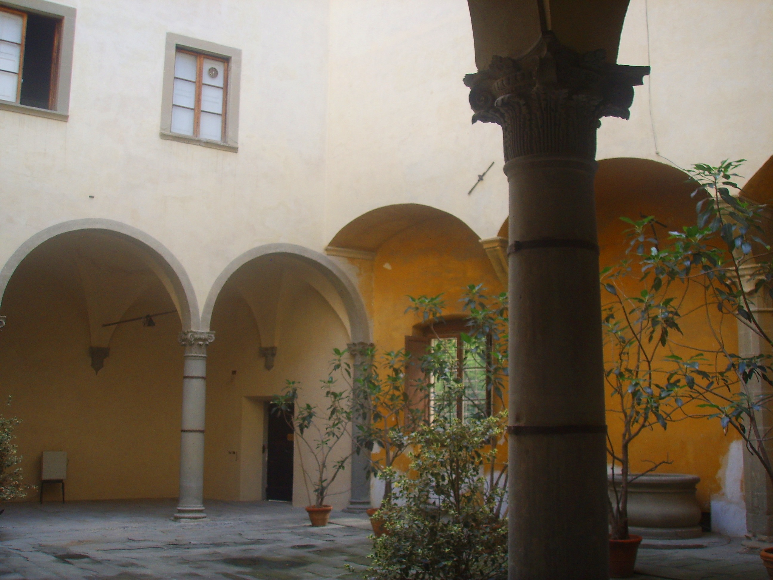 Villa Medicea di Careggi, in Florence, Italy